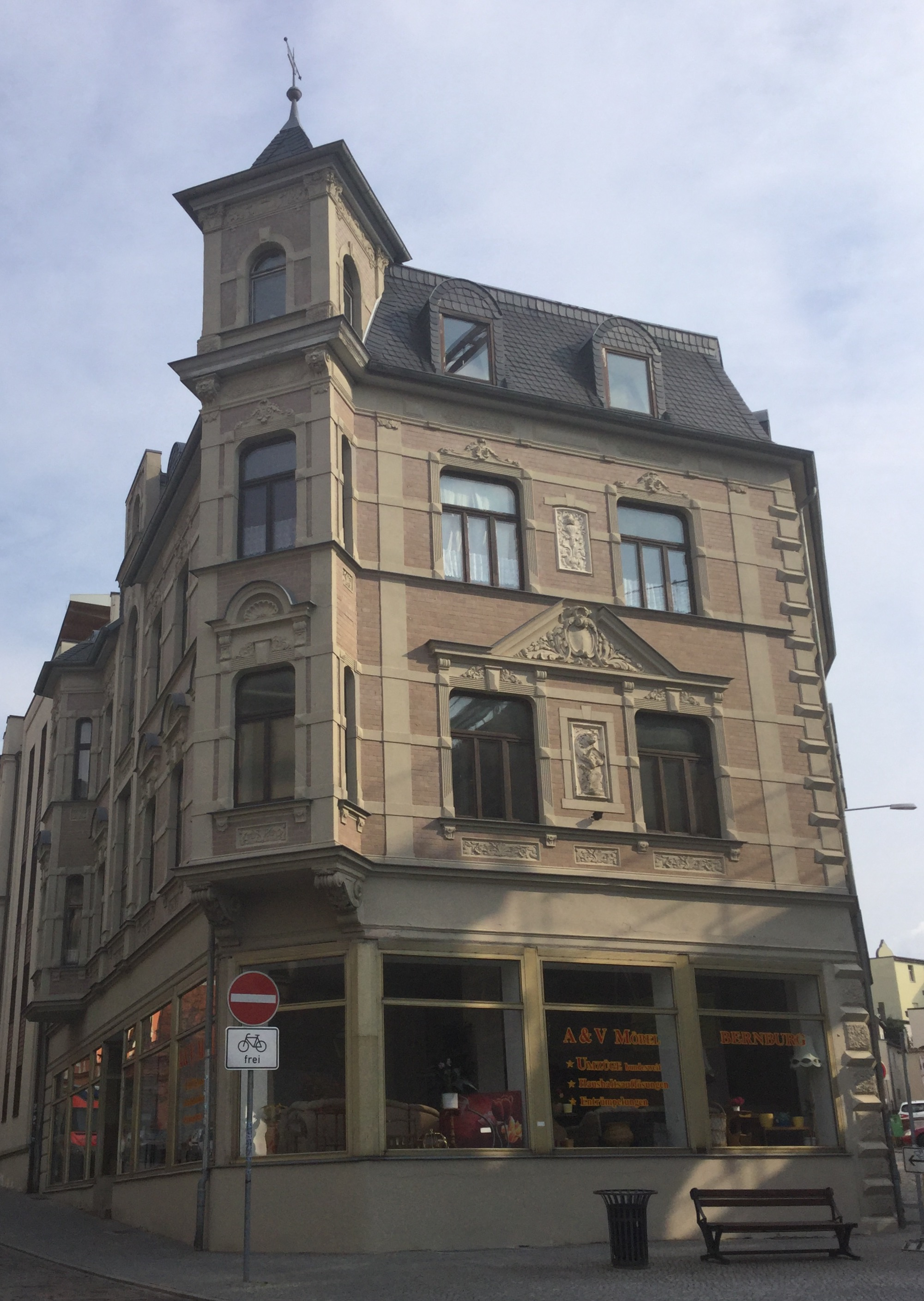 Haus Wilhelmstraße 2b in Bernburg